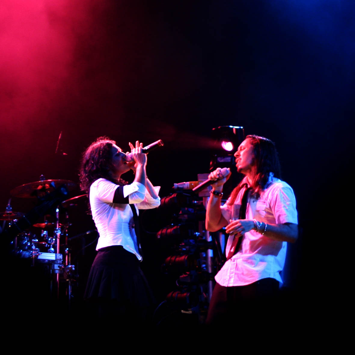 Lacuna coil - Alcatraz, Milan, 26/09/06